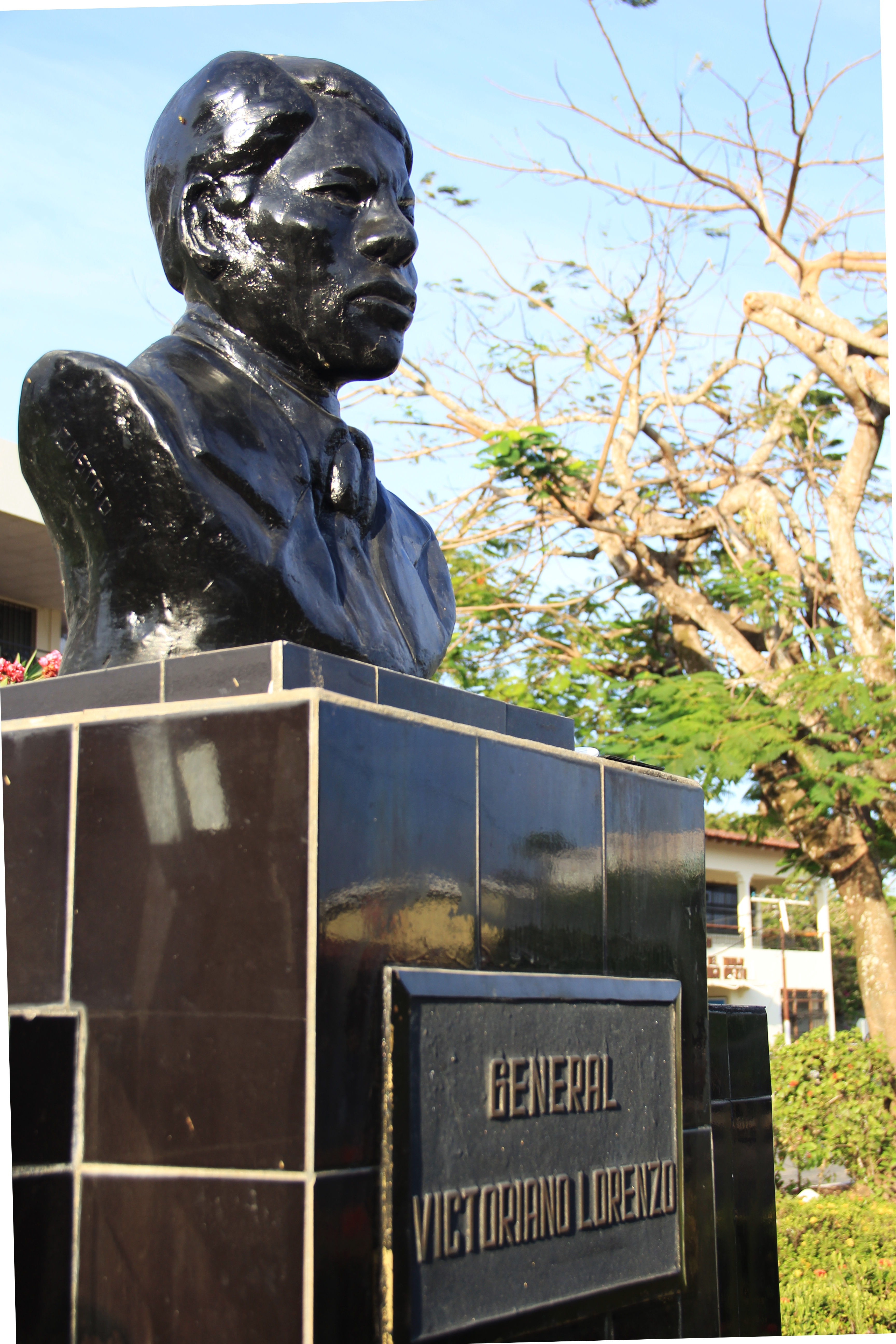 provincia de Coclé, Panamá